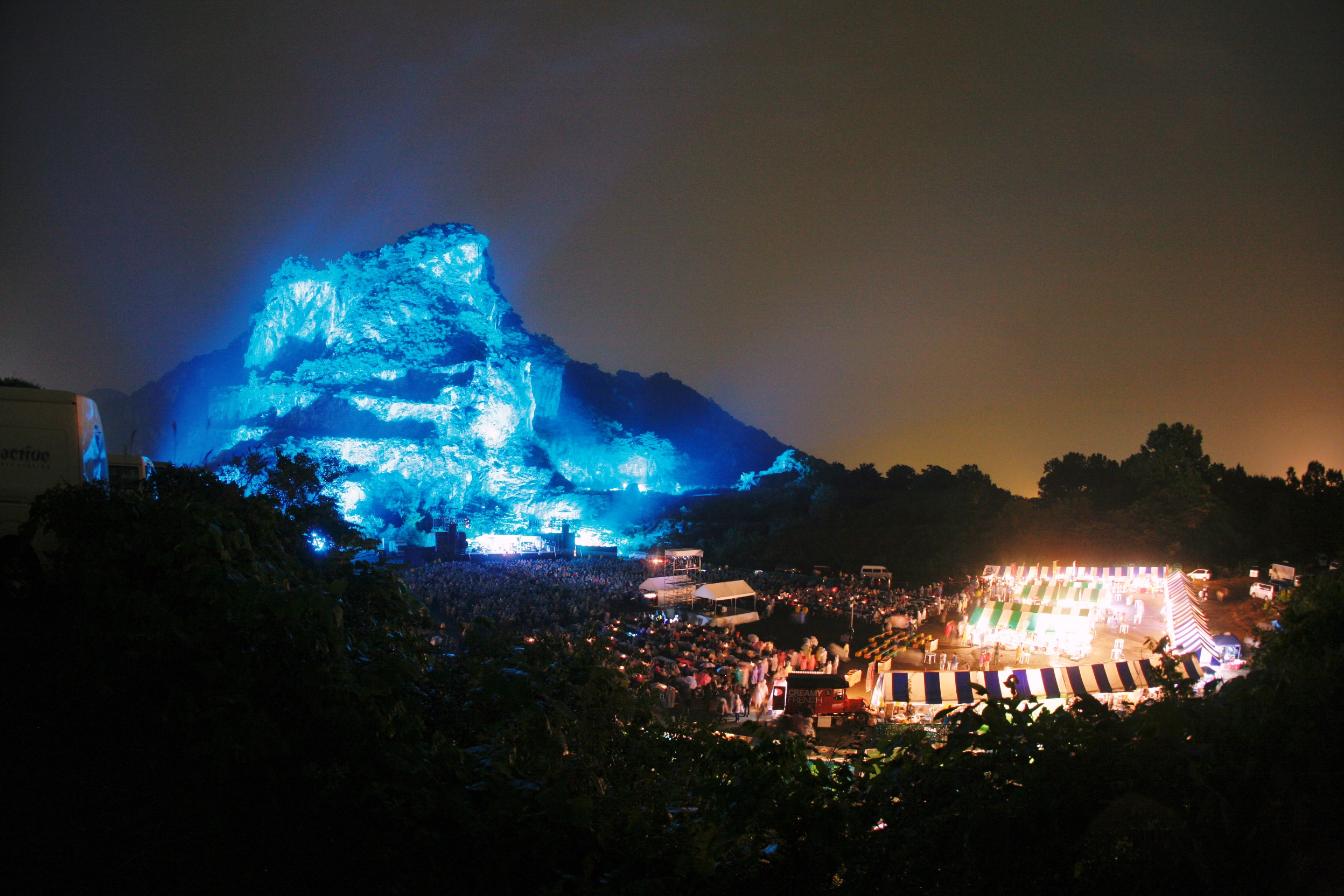 クリフステージ”08 会場の様子